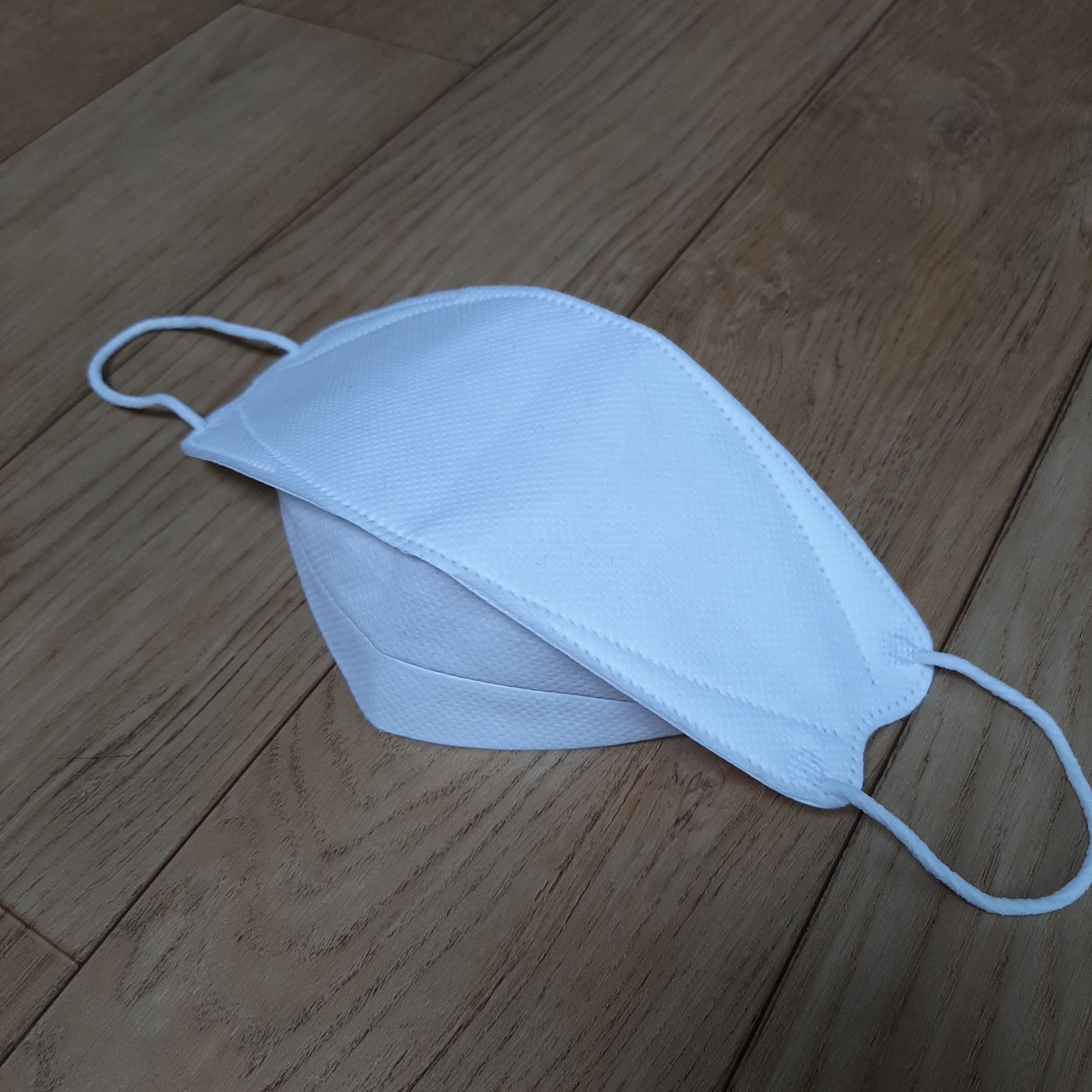 KF94 보건용마스크